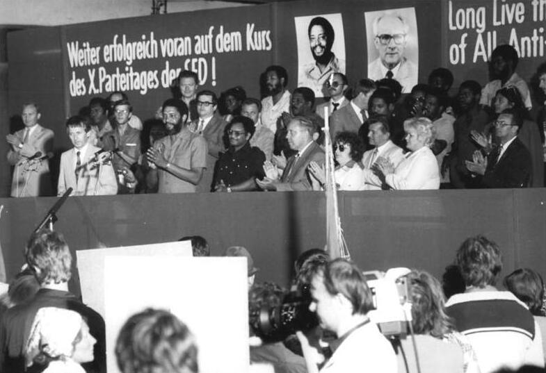 LPG Niederkaina, Besuch durch Maurice Bishop ADN-ZB Häßler 11.6.1982 Bez. Dresden: Maurice Bishop, Vorsitzender des Politbüros des ZK der Neuen Jewel-Bewegung und Ministerpräsident der Revolutionären Volksregierung Grenadas, besuchte die LPG in Niederkaina, Kreis Bautzen. Hier bei einem Meeting mit Genossenschafstbauern und Arbeitern der LPG.